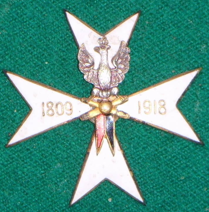 Zdjecie odznaki pamiątkowej dywizjonów artylerii konnej II RP